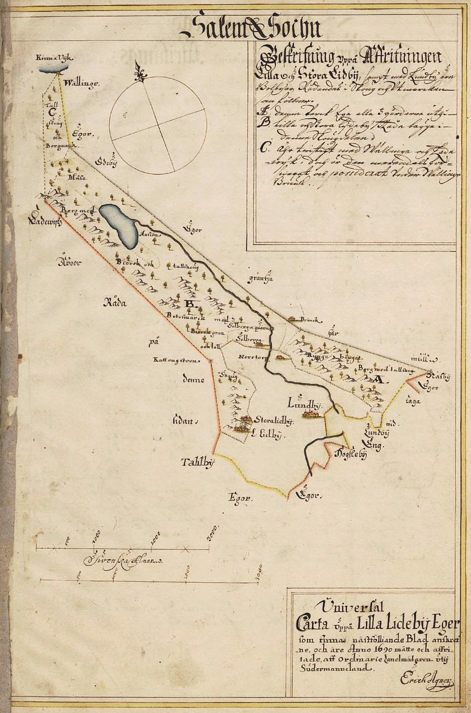 Karta över Stora och Lilla Lideby ägor